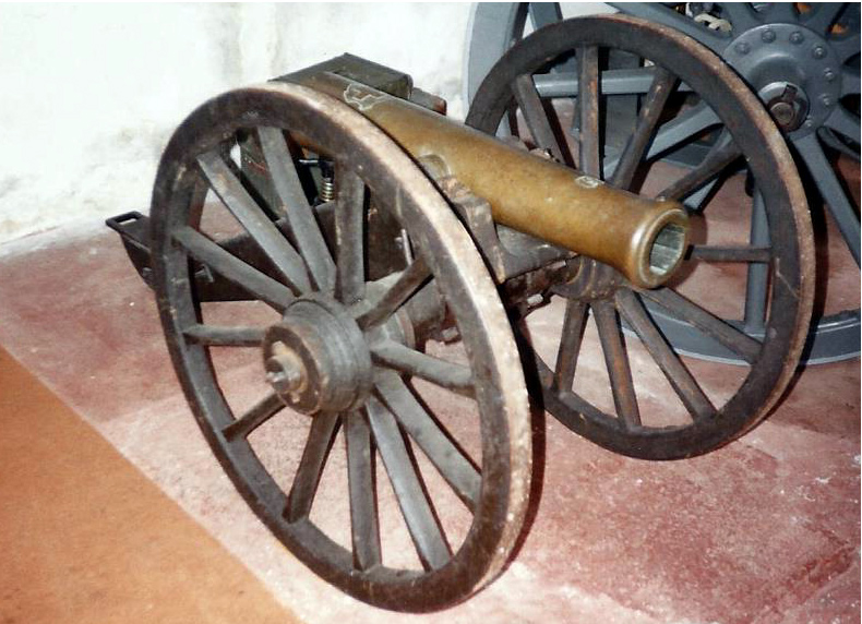 Geb Kan 1864